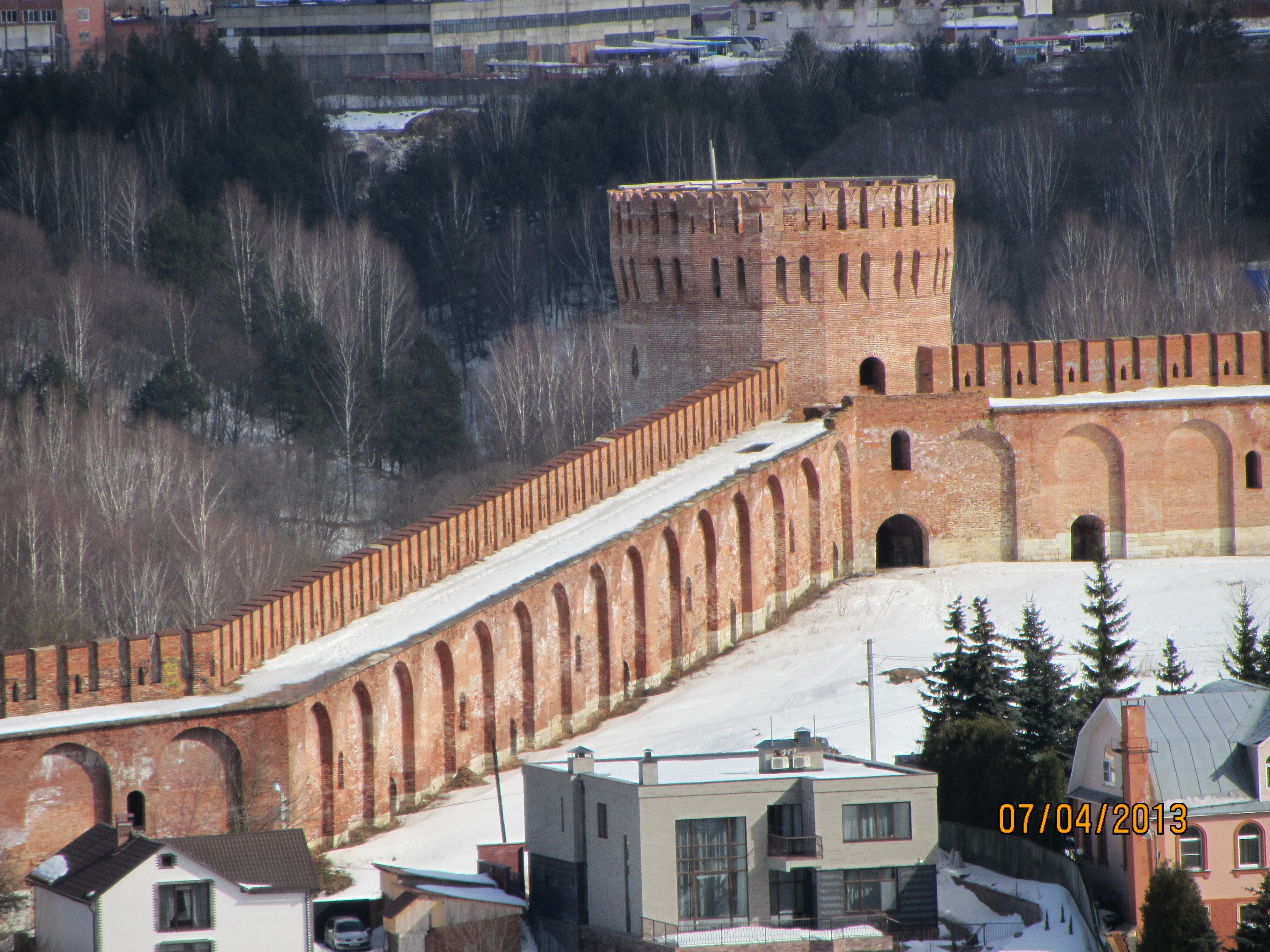 Башня Орел (Городецкая) (Смоленская область, Смоленск, сквер Памяти героев, Маршала Жукова улица, Октябрьской Революции улица, Соболева улица, Студенческая улица, Тимирязева улица, центральный парк культуры и отдыха)